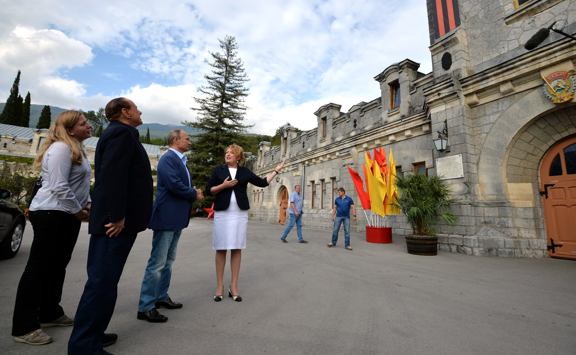 Владимир Путин встретился в Крыму с Сильвио Берлускони, находящимся в России с частным визитом